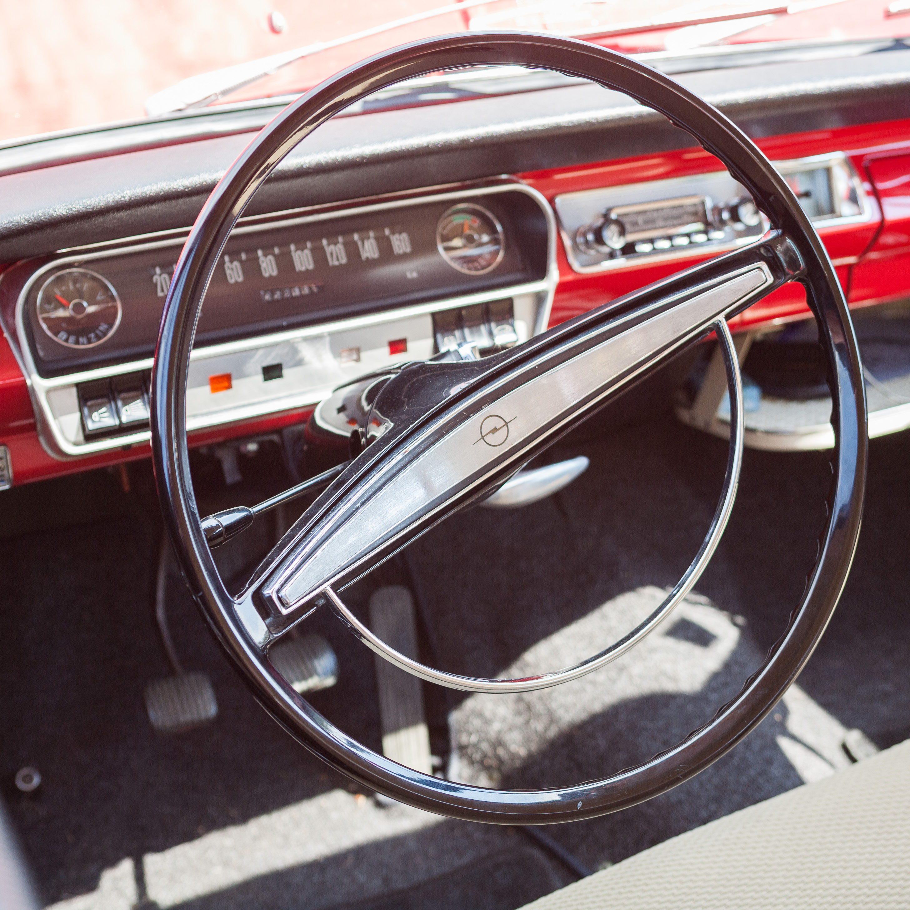 Rheinbach Classics 2007 – Lenkrad und Armaturenbrett eines Opel Rekord A